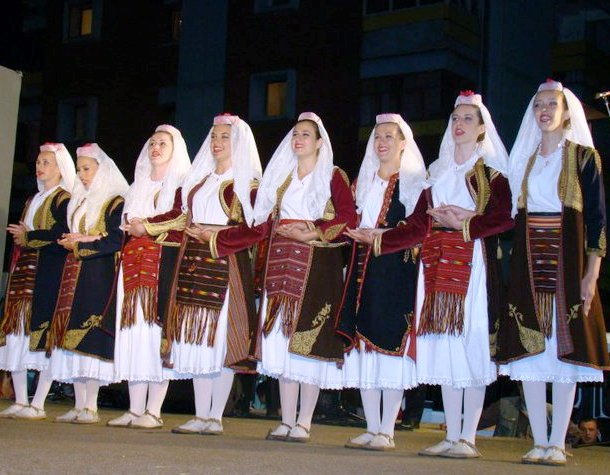 Snimak: Radosav Stojanović